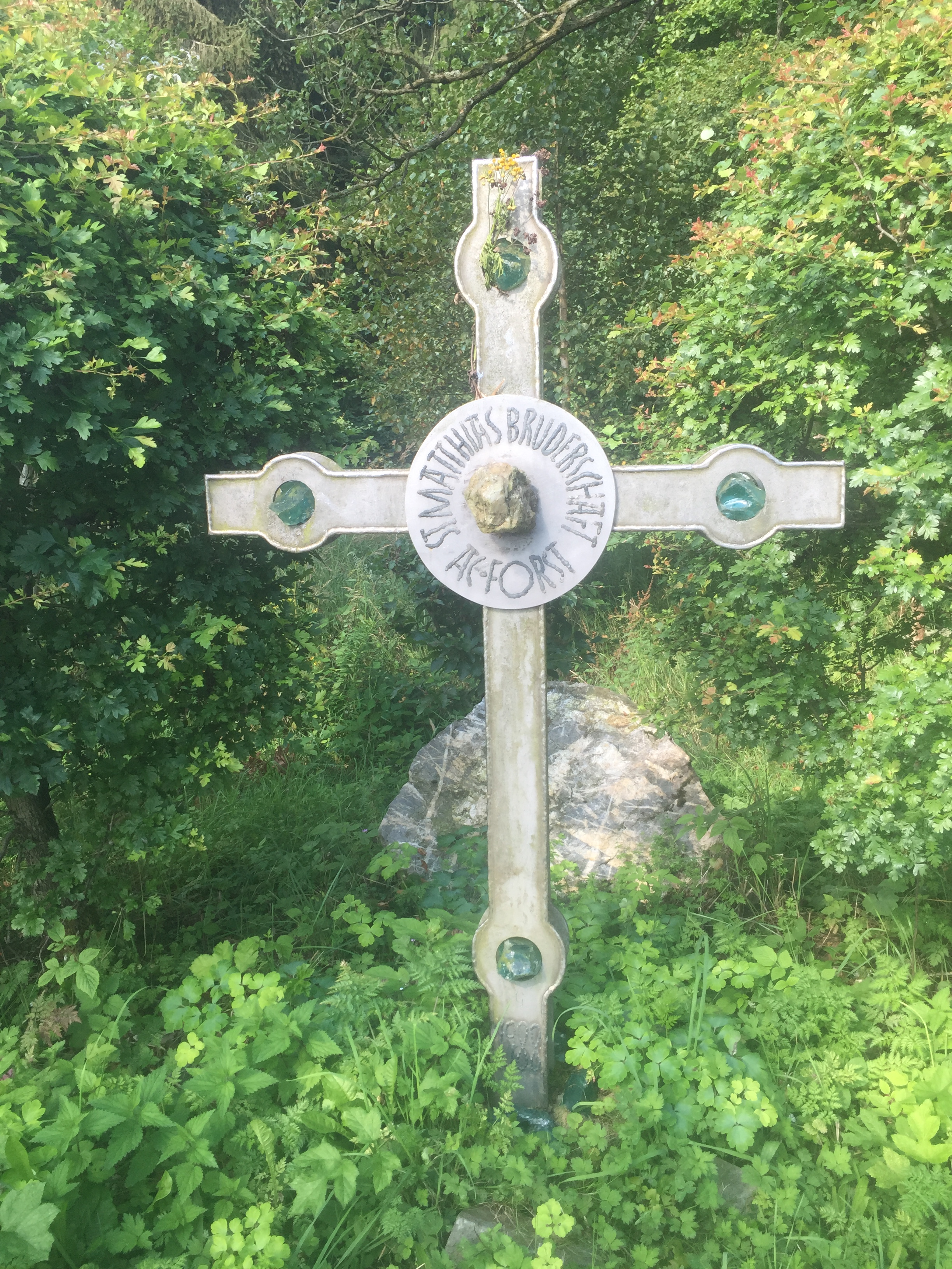 Crucifijo erigido por una Matthiasbruderschaft junto al camino de Matías. los monjes Miembros hicieron una copia Autentica de la Cruz de San Matias. En el se lee en latin por mediación de Matias libranos del mal.